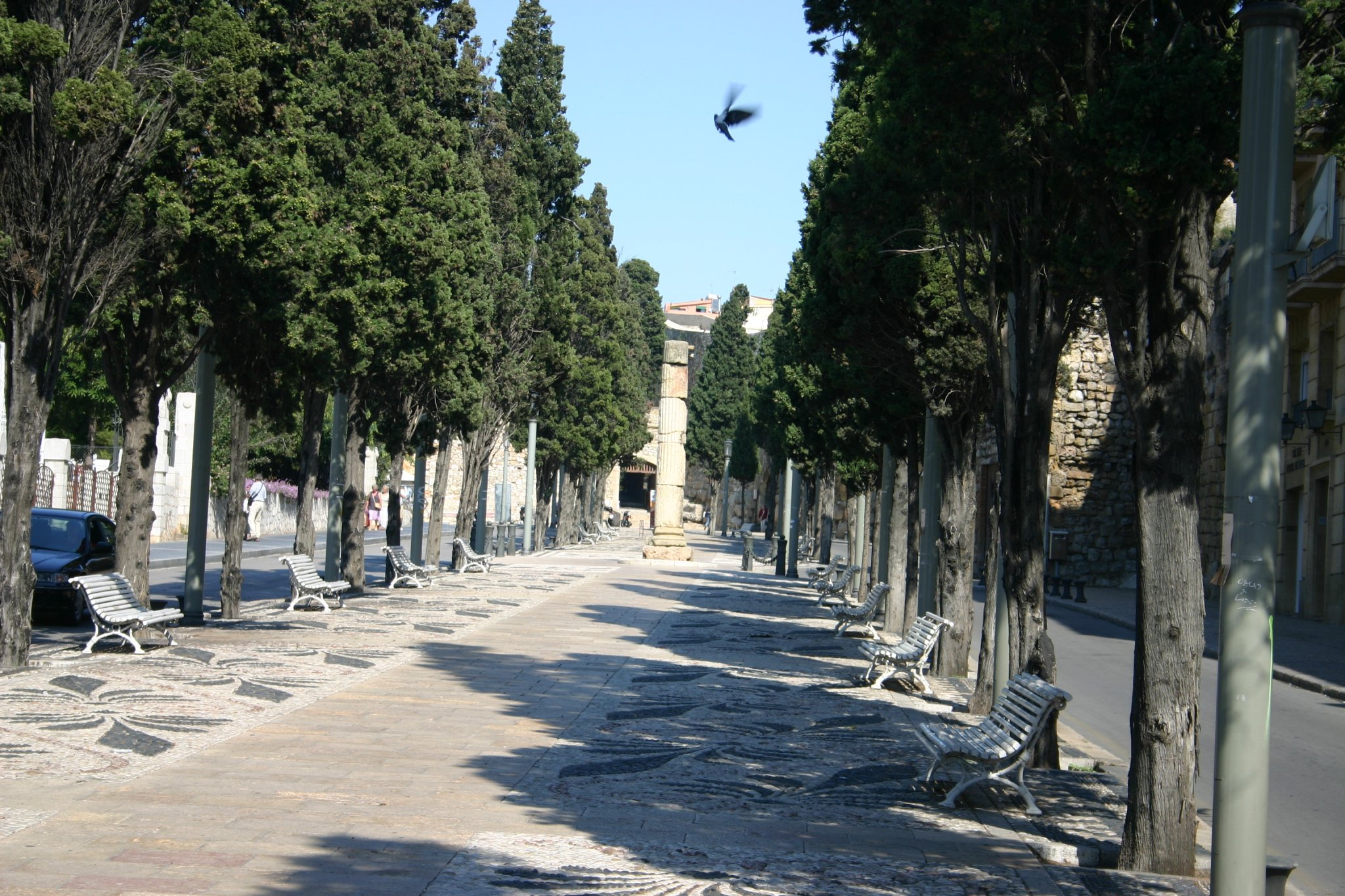 Tarragona. Via del Imperio Romano